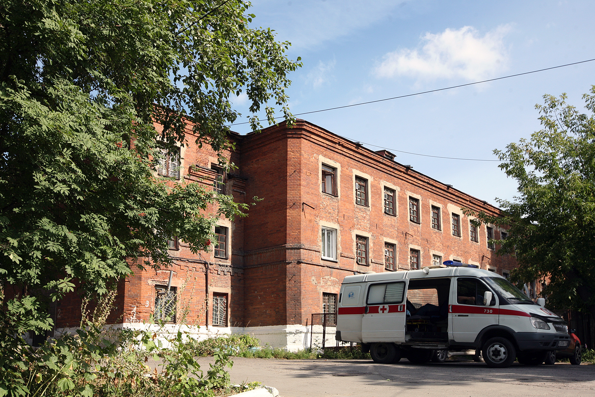 «Красные казармы», комплекс зданий военно-остановочного пункта: Железнодорожный район, Новосибирск, Новосибирская область